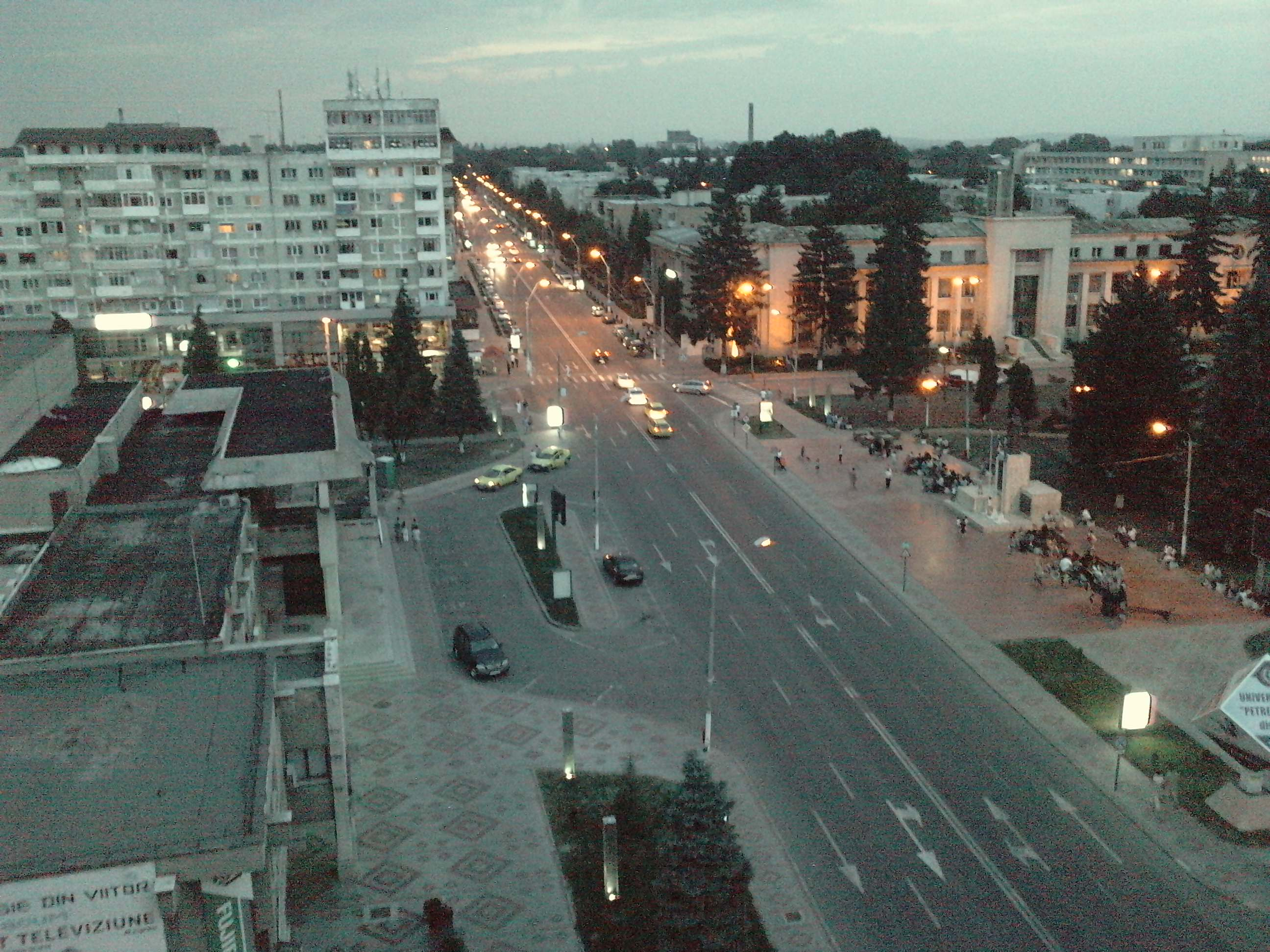 vista de arriba del centro de la ciudad de Roman